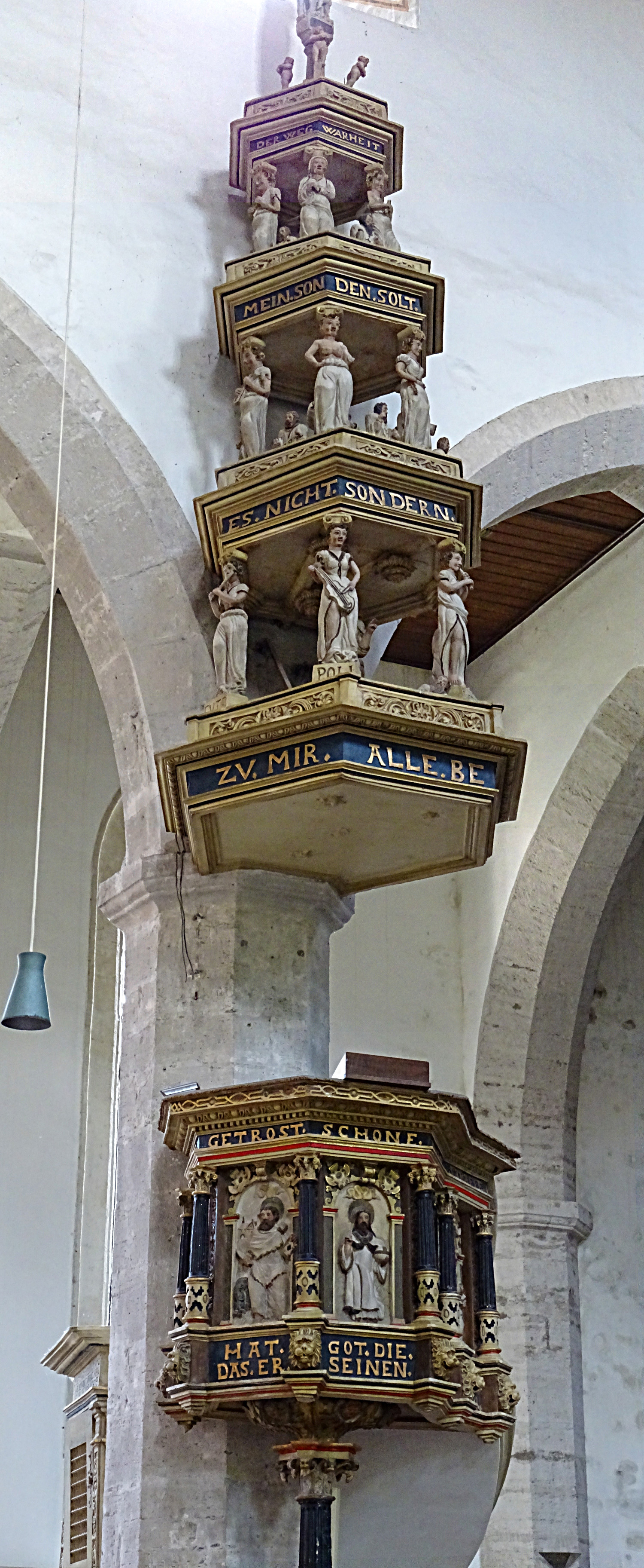 Renaissancekanzel von 1590 in der Bergkirche St. Stephani (Langensalza)